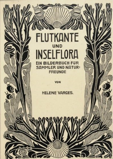 Helene Varges Flutkante und Inselflora Einband 1928